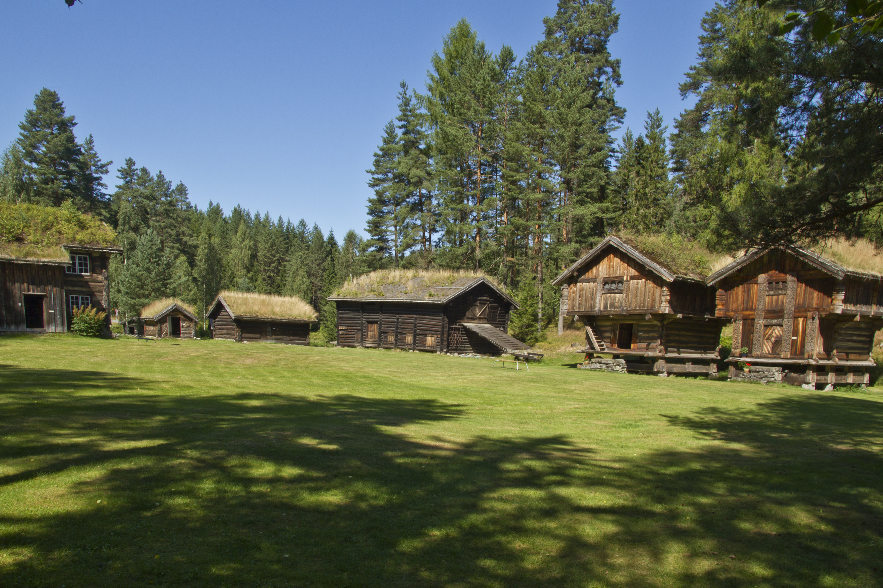 Kviteseid Bygdemuseum